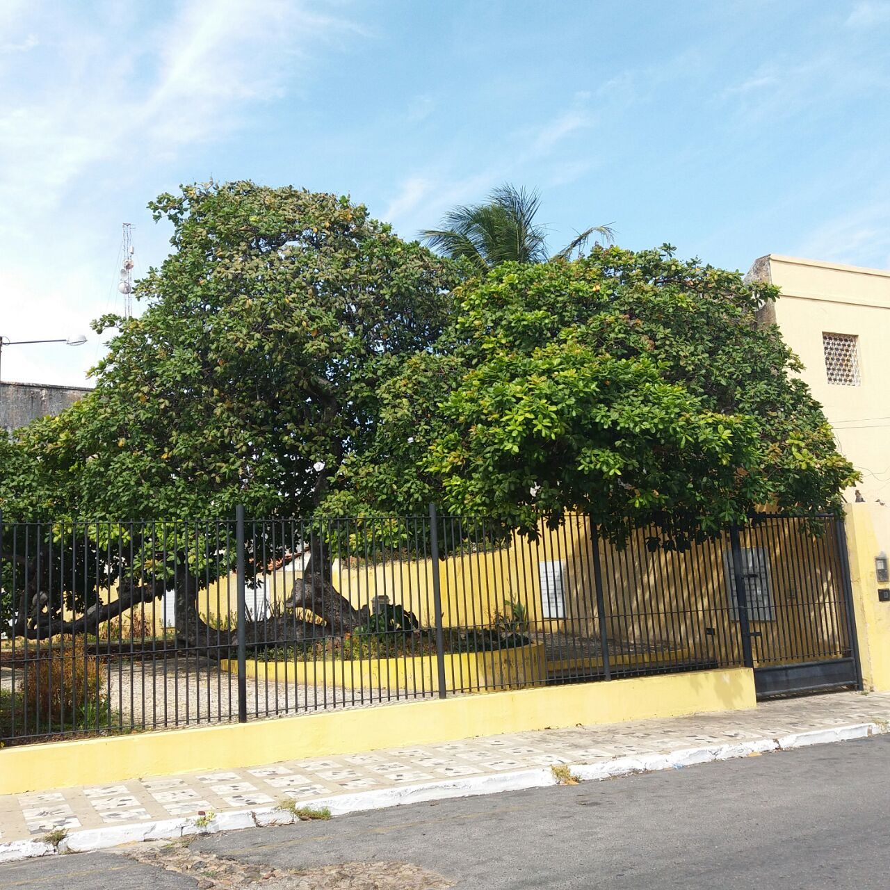 Árvore cajueiro que o escritor Humberto de Campos plantou nos últimos anos do século em Paranaíba, no Piauí. Tombada pela lei do patrimônio histórico e Parnaíba.